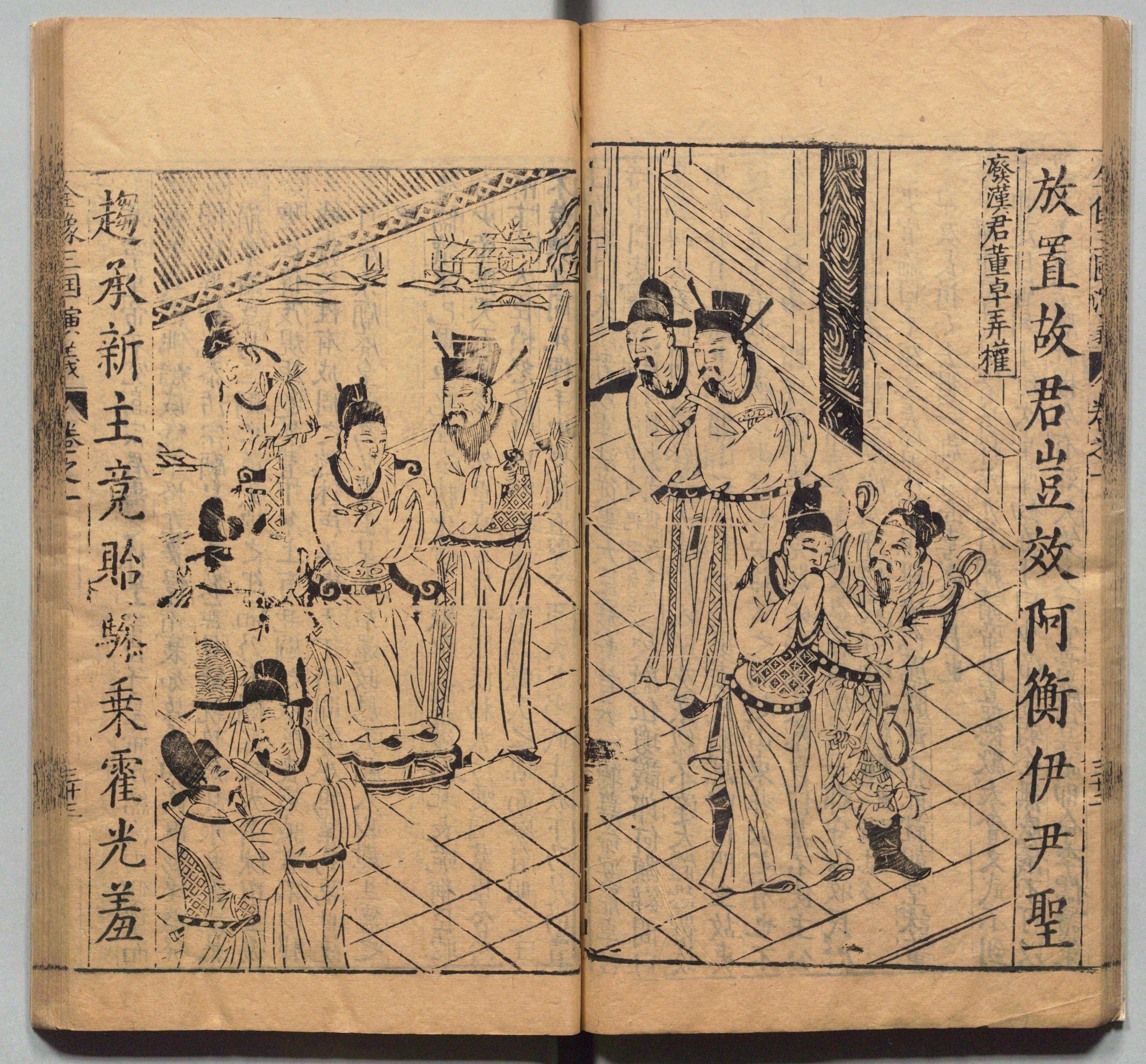 《新刊校正古本大字音释三国志通俗演义》 明万历十九年书林周曰校刊本